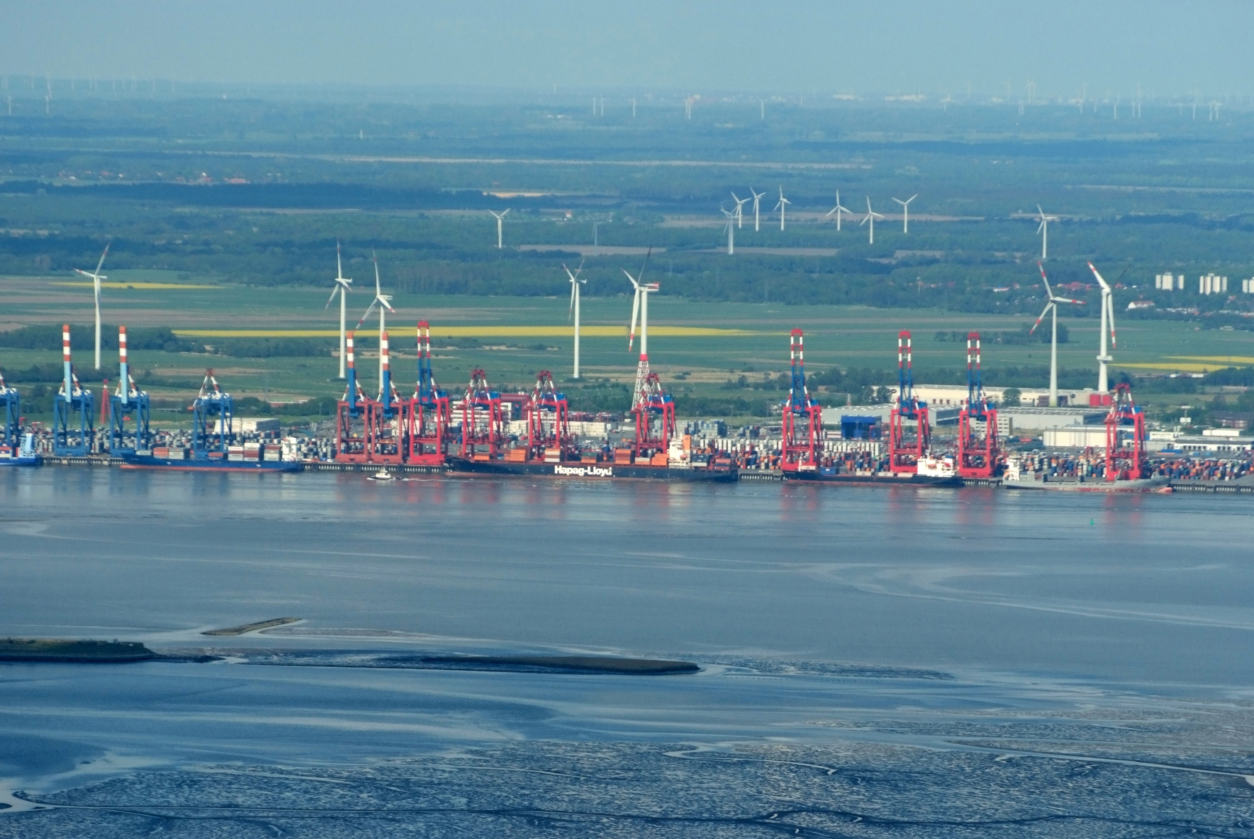 Fotoflug vom Flugplatz Nordholz-Spieka über Bremerhaven, Wilhelmshaven und die Ostfriesischen Inseln bis Borkum